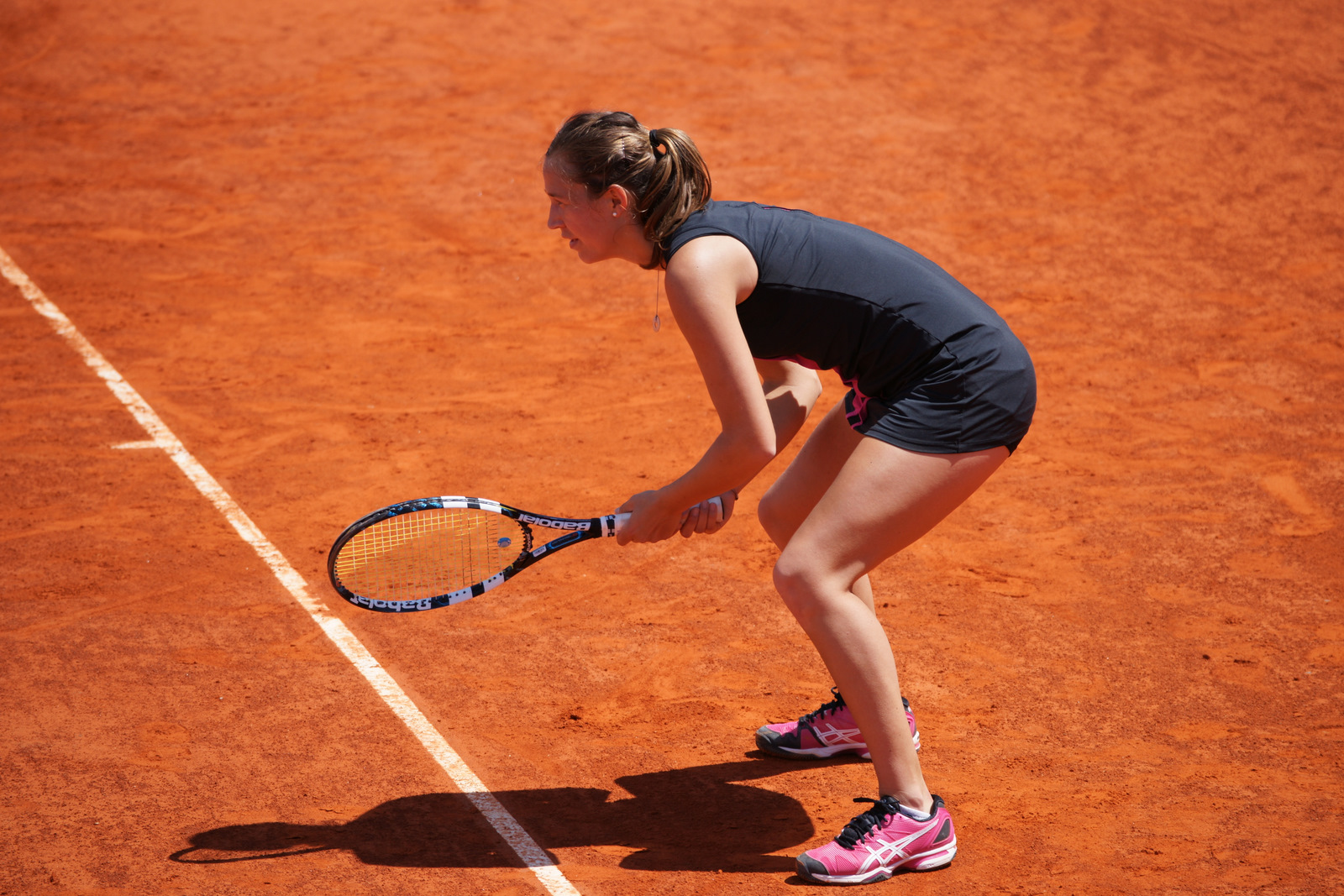 Audrey Bergot, Open tennis Cagnes-sur-Mer, 2012